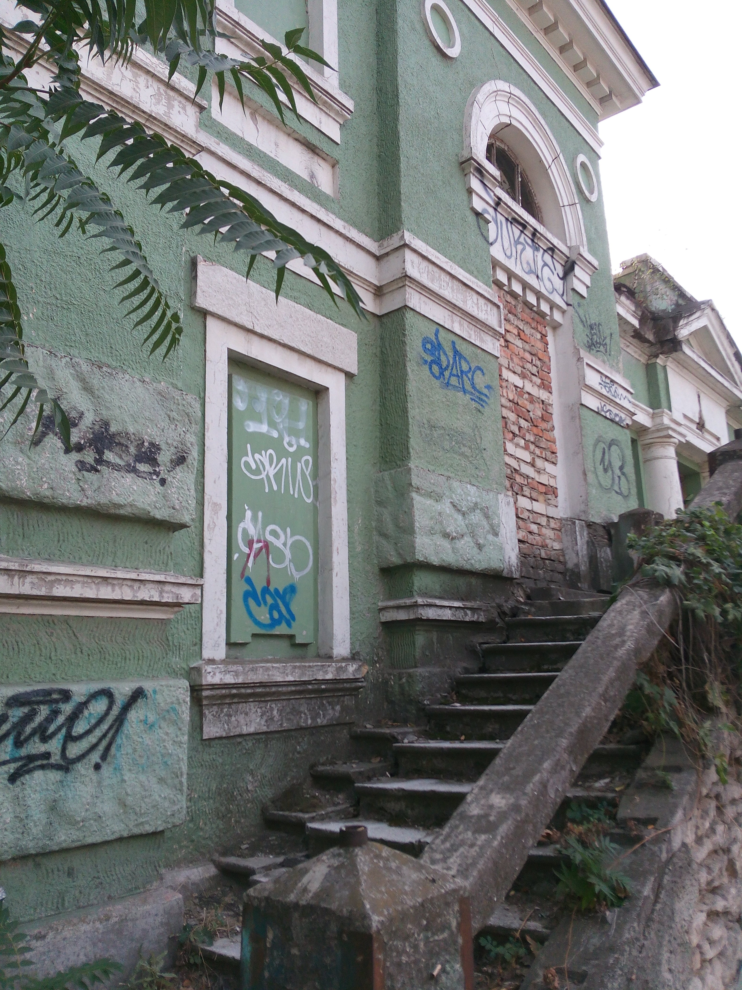 Кінотеатр «Ампір» (мур.), Херсон, вул. Театральна (Горького), 17